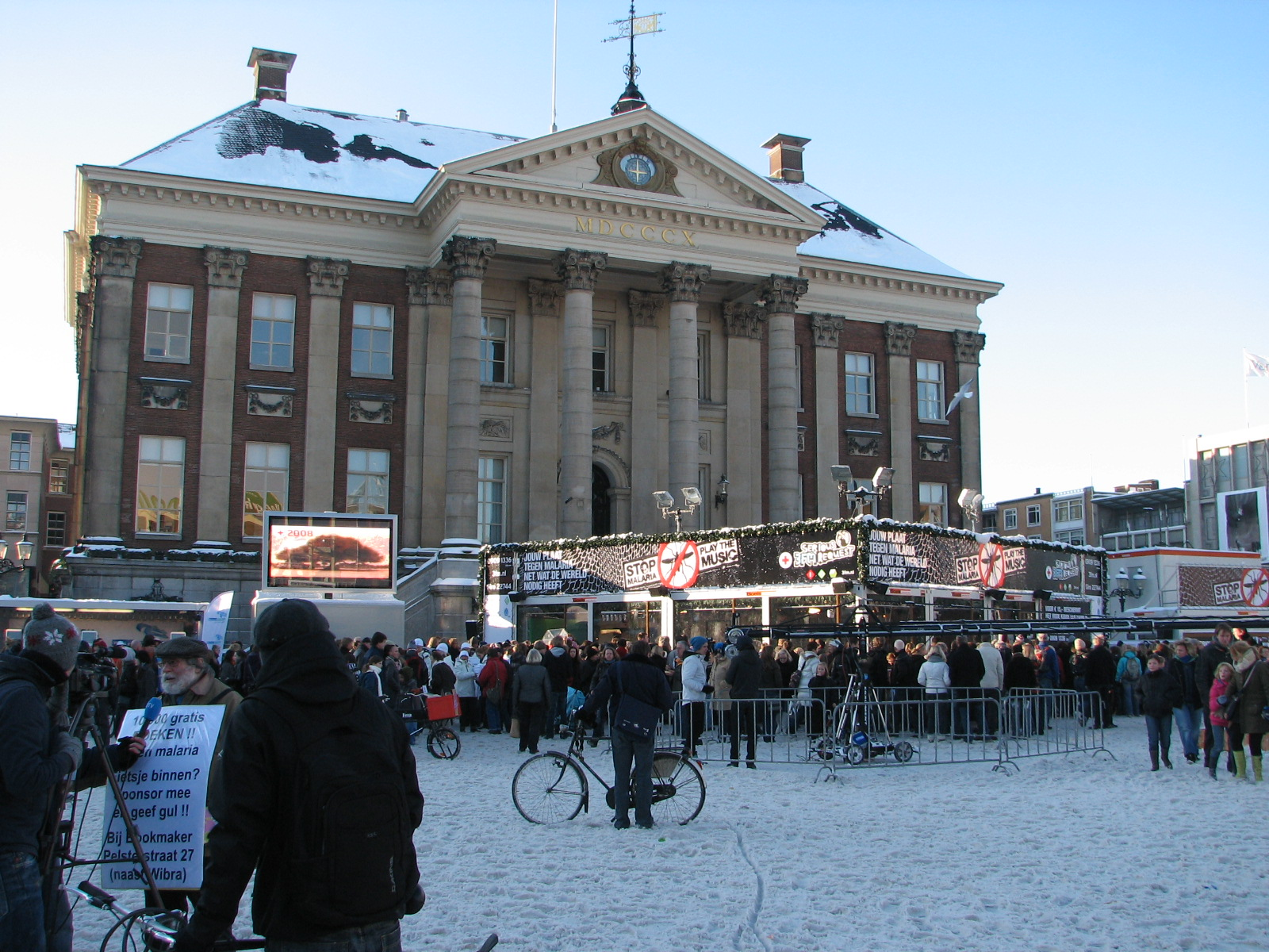 Het glazen huis in Groningen op maandag 21-12-2009